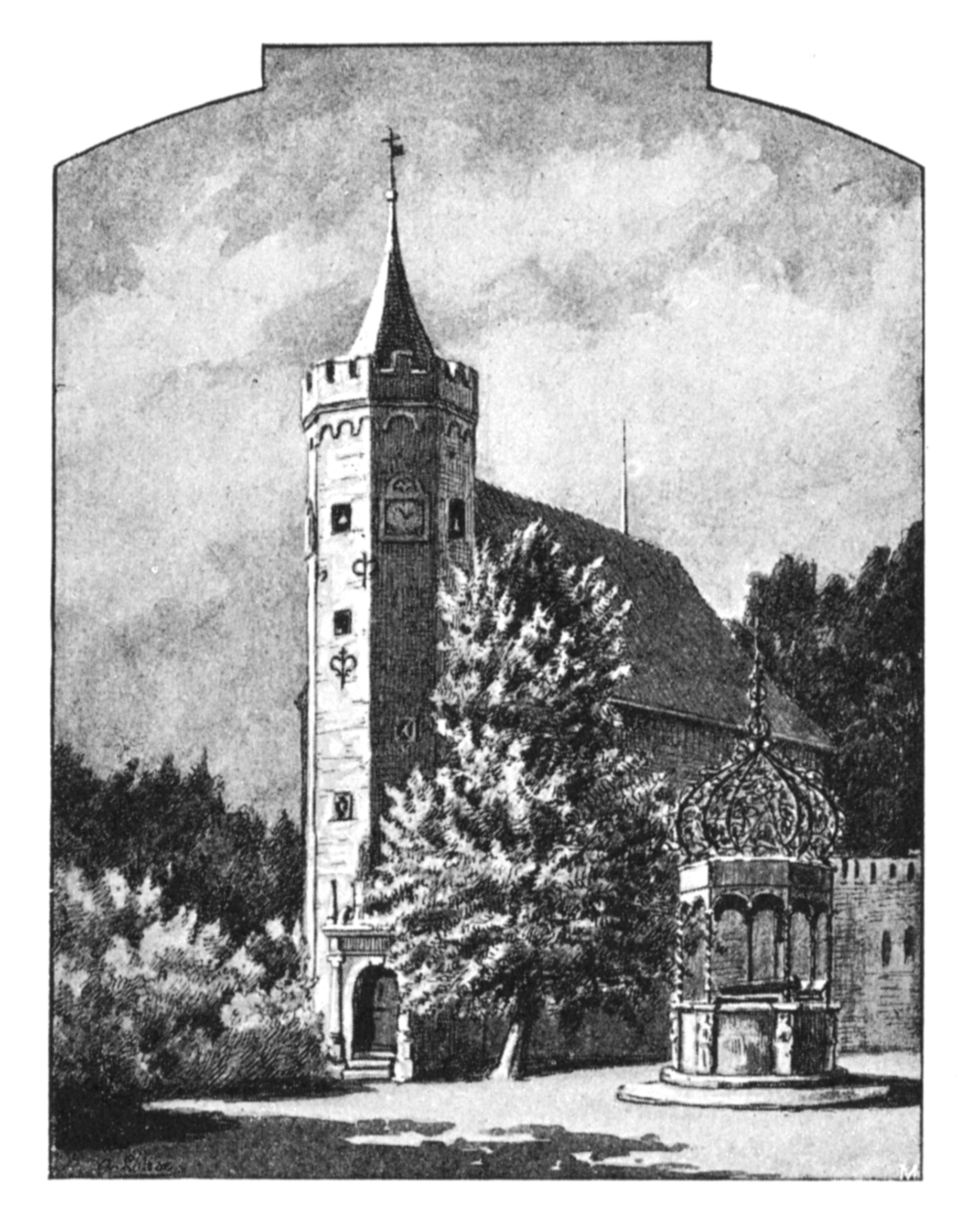 Breitenburger Kapelle mit Brunnen.